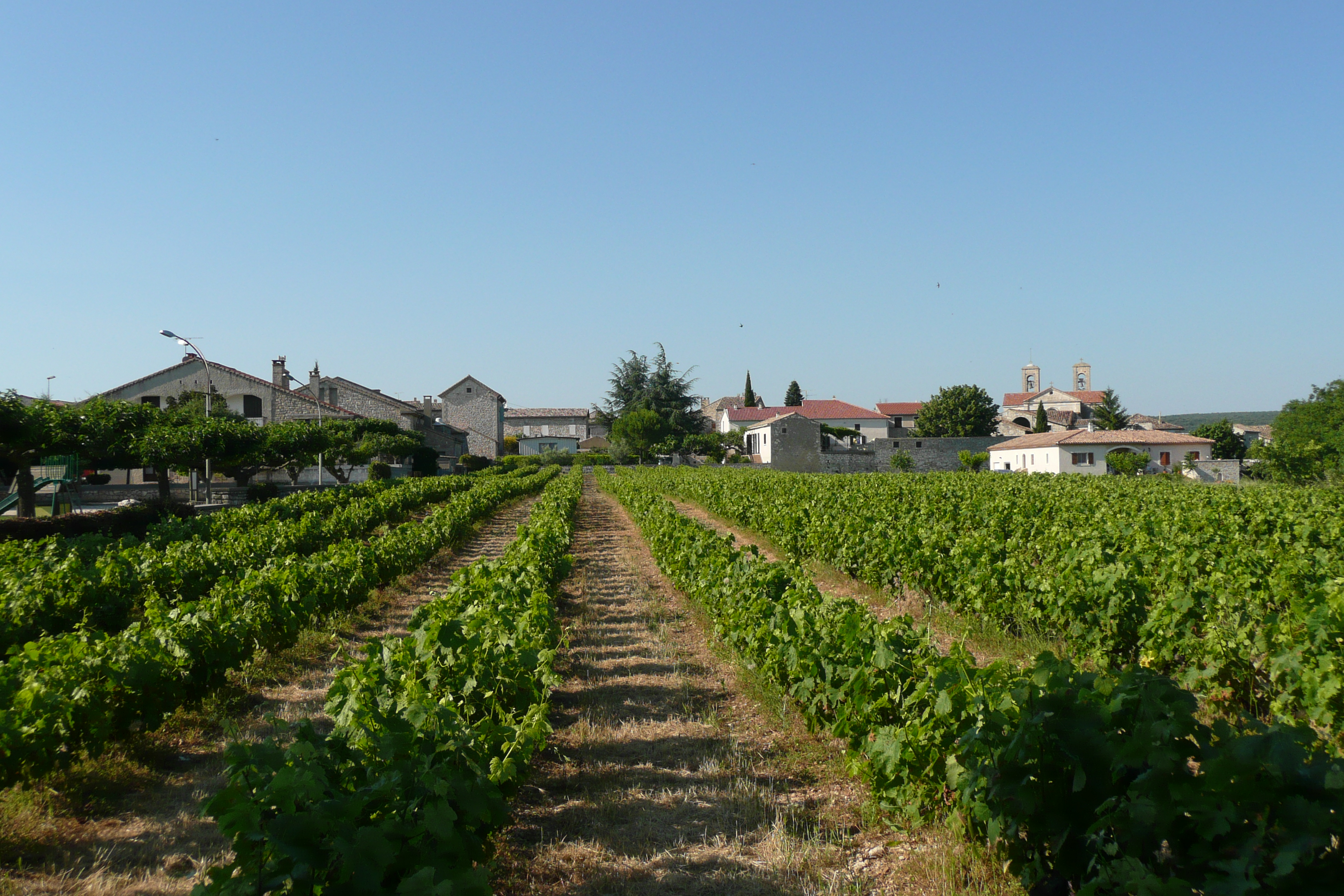 Vue d'ensemble d'Orgnac-l'Aven.